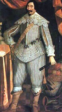 Matteo Gallas